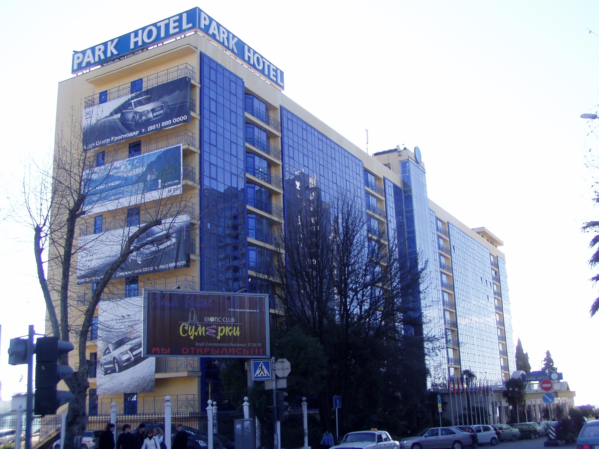 Рэдиссон Парк Отель в Сочи